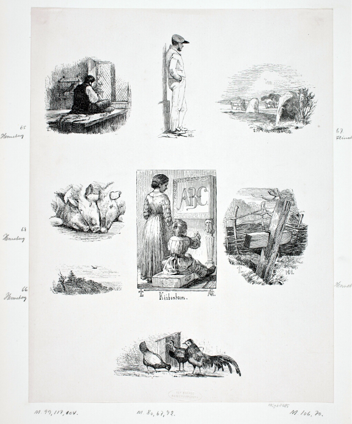 Otte træsnit efter J. Th. Lundbye. Medlemsblad fra Den Danske Radeerforening, 1839 – 1849